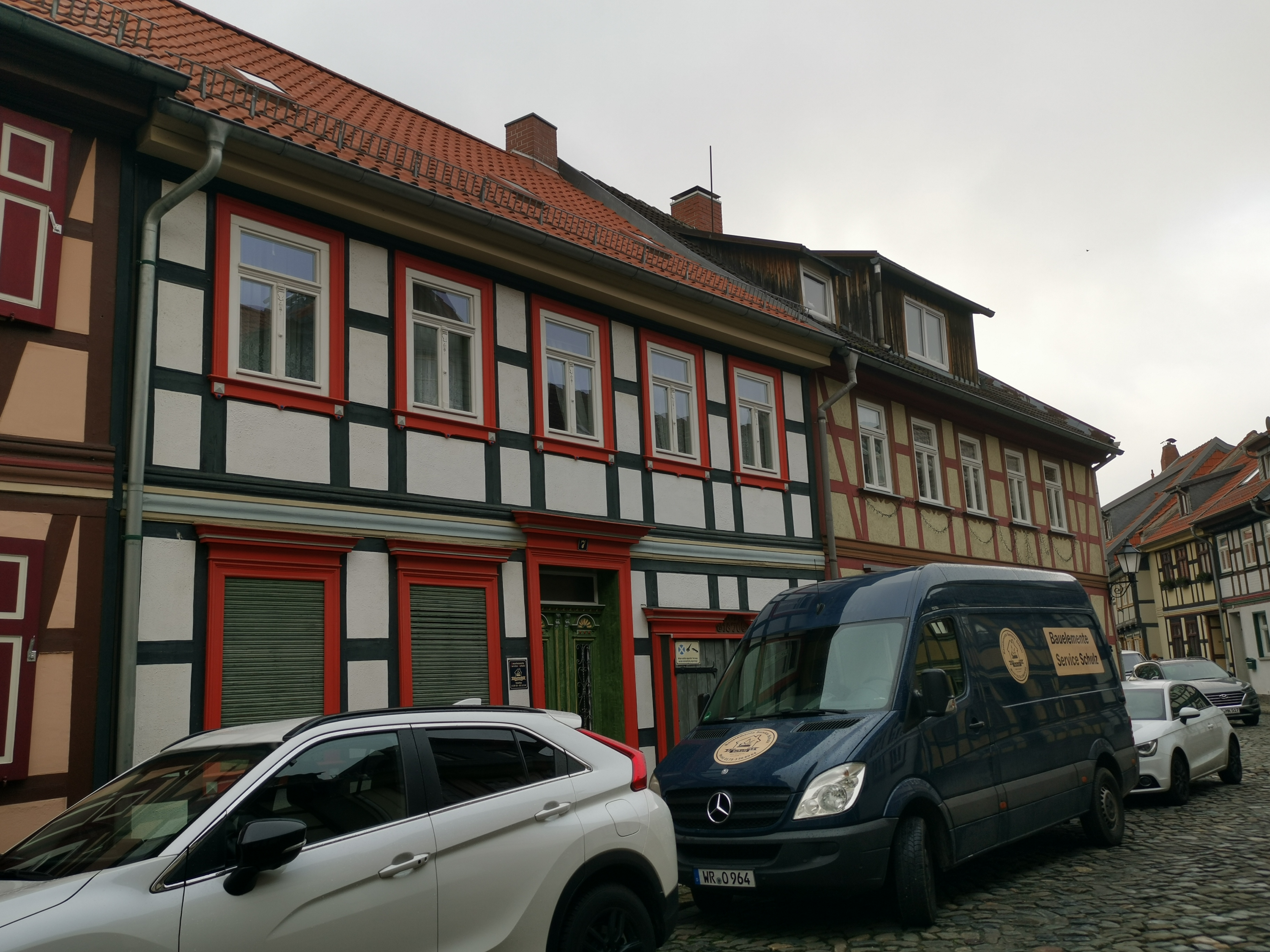 Hinterstraße 7 in Wernigerode